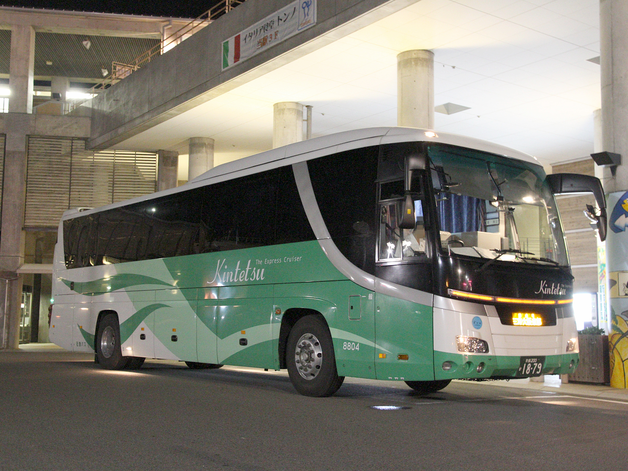 登録番号 京都200か18-79 近鉄バス㈱京都営業所所属 夜行高速路線用車両 2012年6月 土佐くろしお鉄道奈半利駅にて撮影 撮影者 Zondag2000